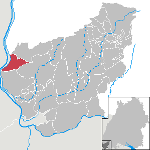 Bad Bellingen, Landkreis Lörrach, Baden-Württemberg